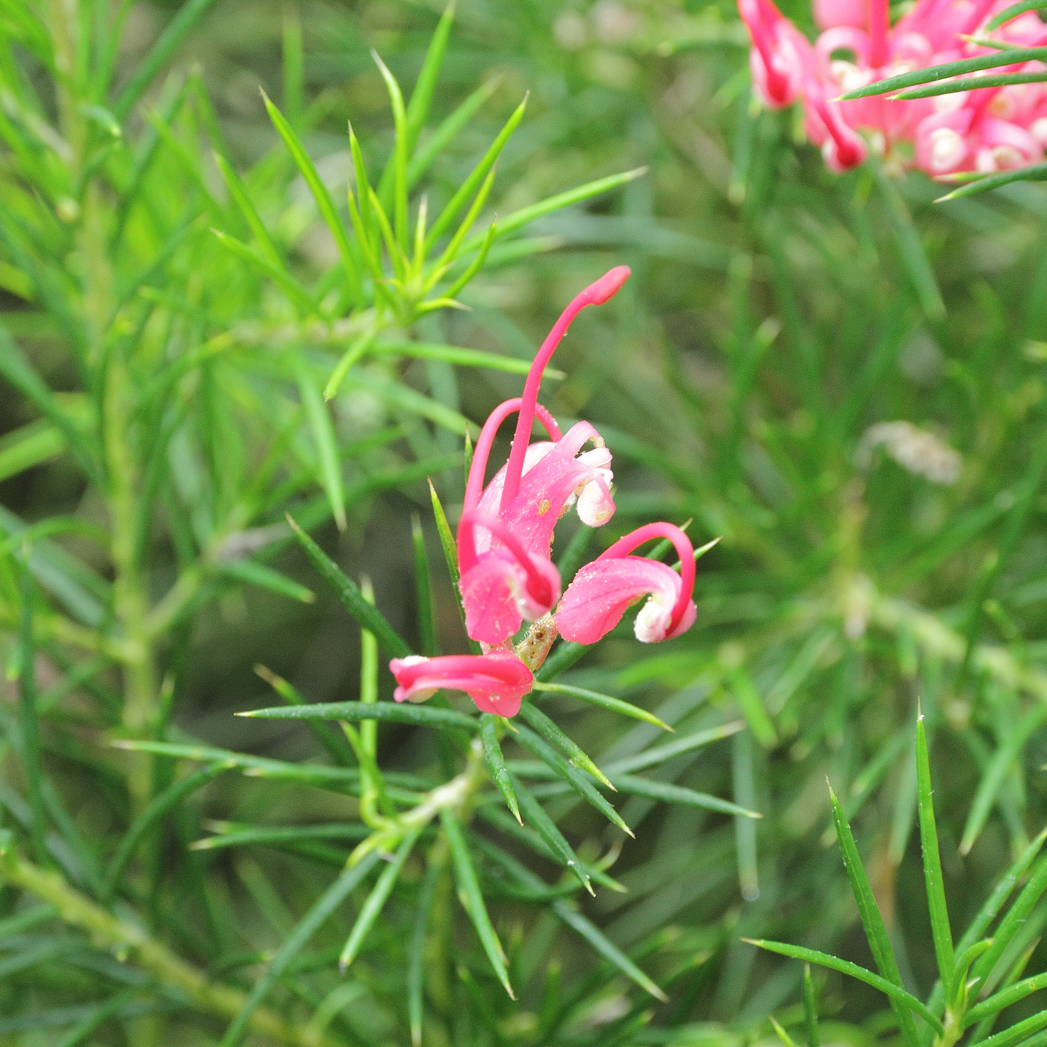 Grevillea juniperina i Bergianska trädgården.